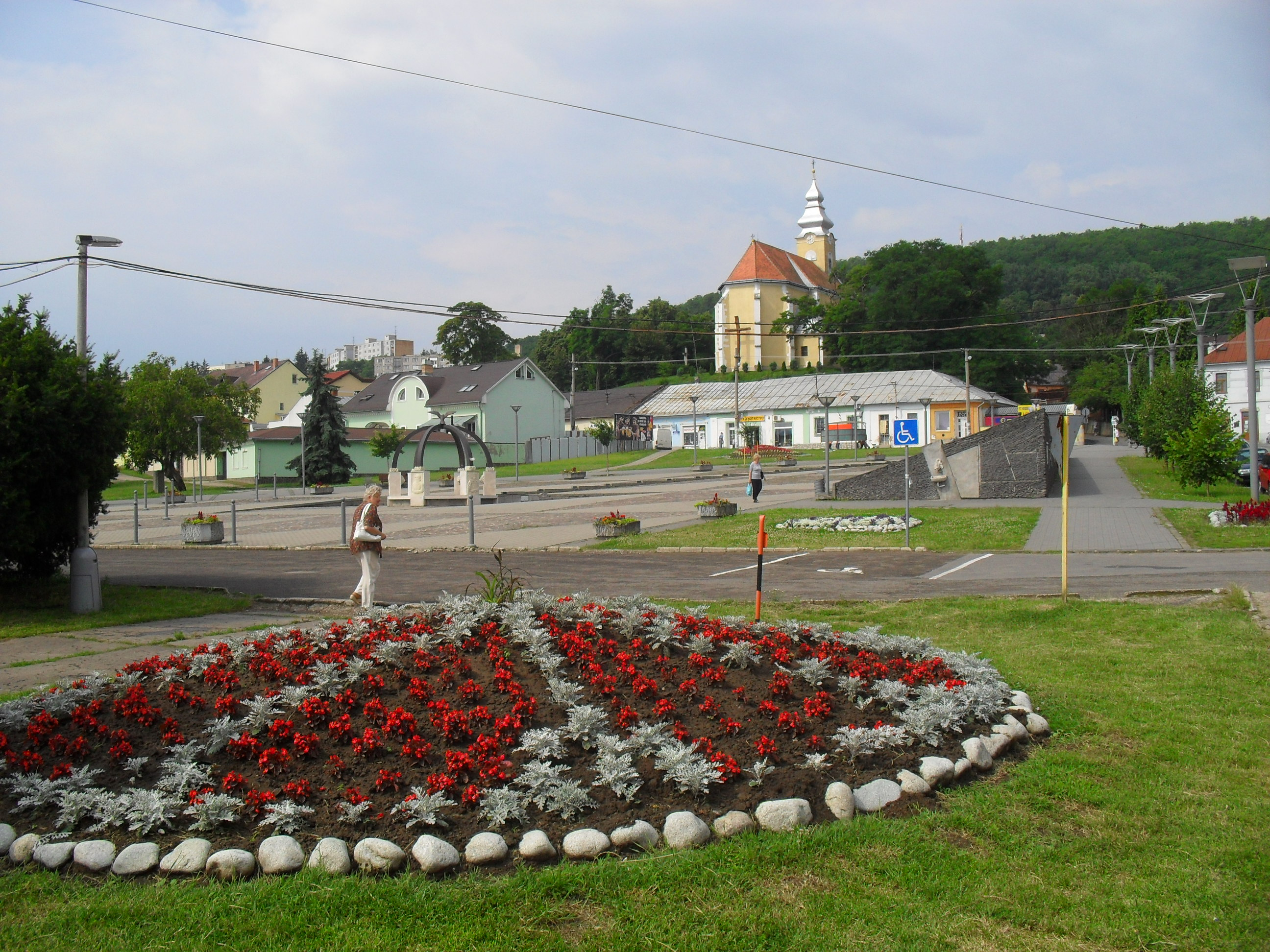 Királyhelmec - főtér